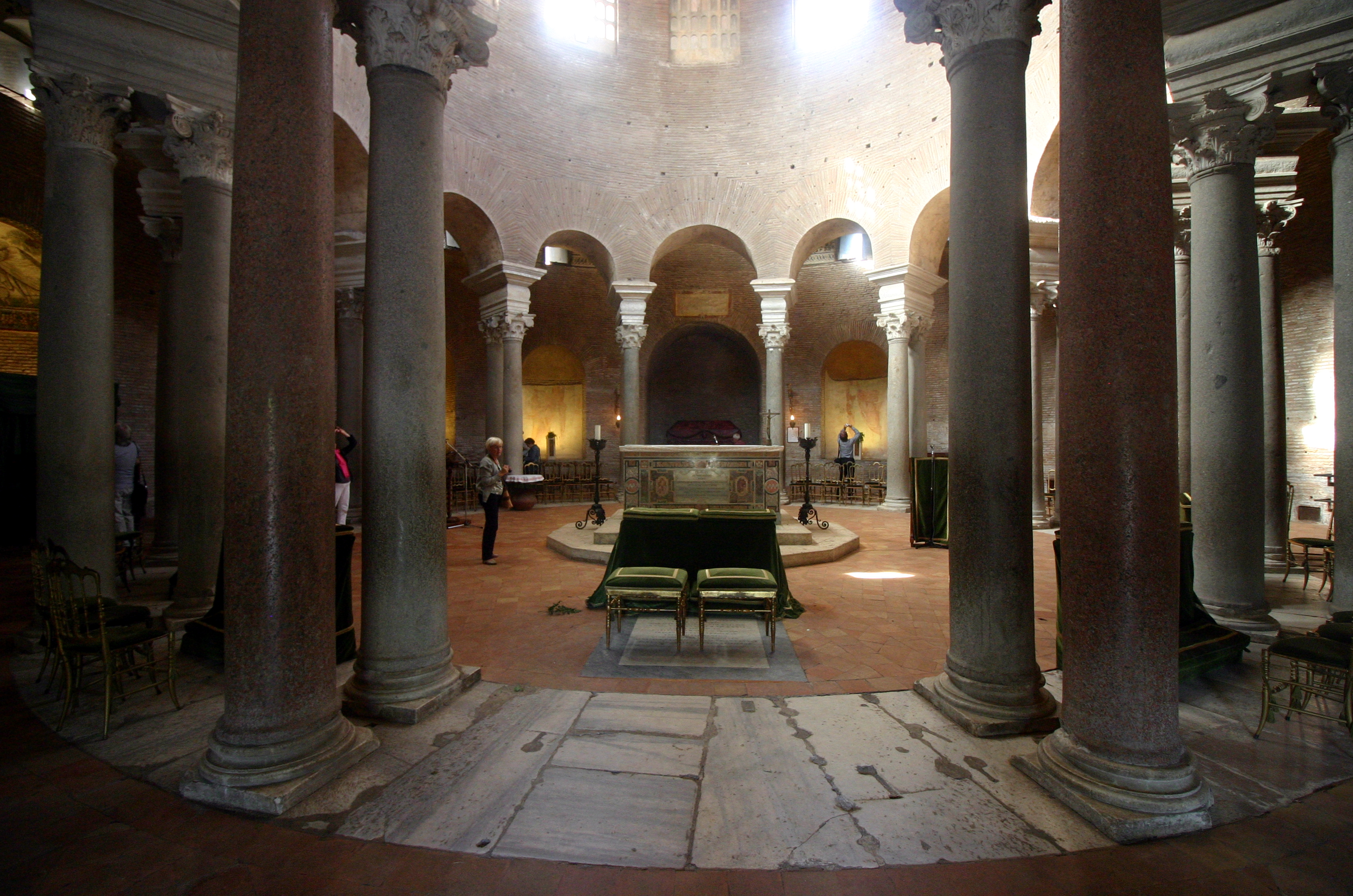 Santa Costanza - Rome